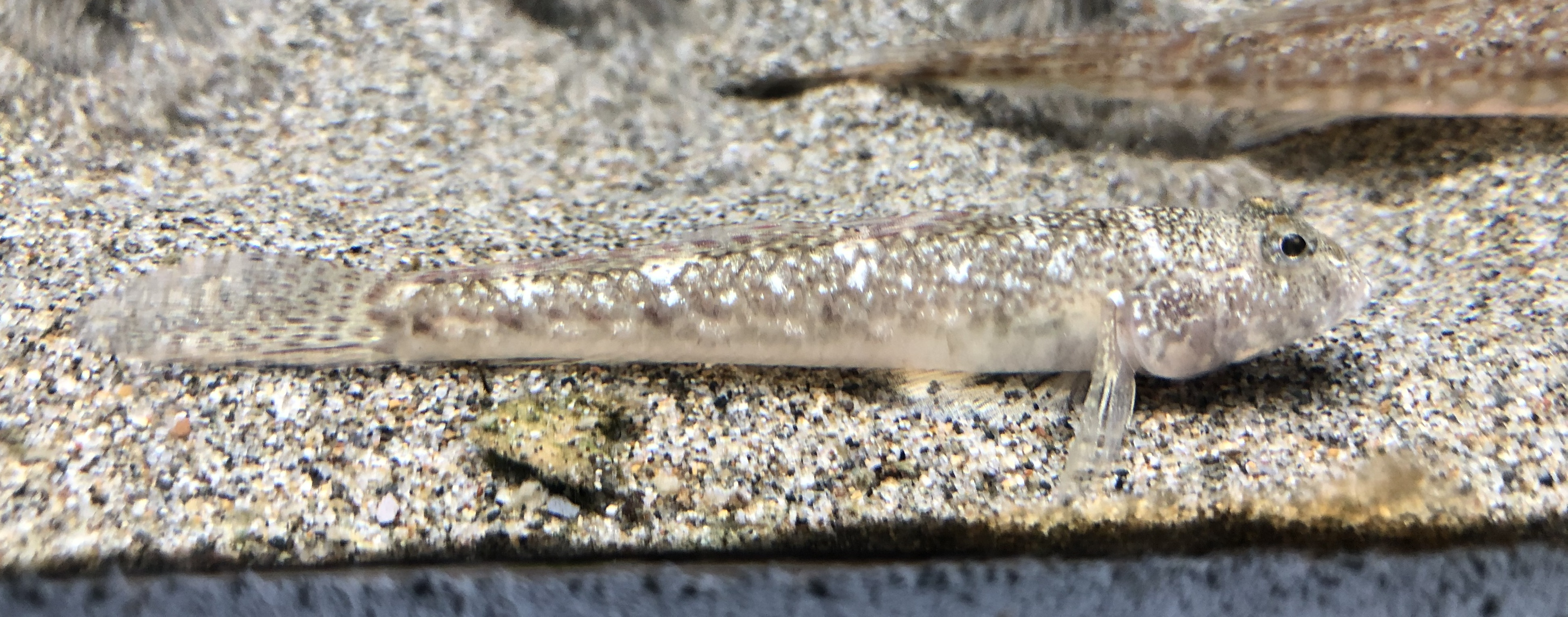 ヒメハゼ。新潟市水族館 マリンピア日本海飼育展示個体。